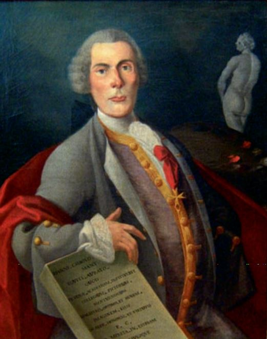 Ritratto di Giovanni Antonio Cadioli